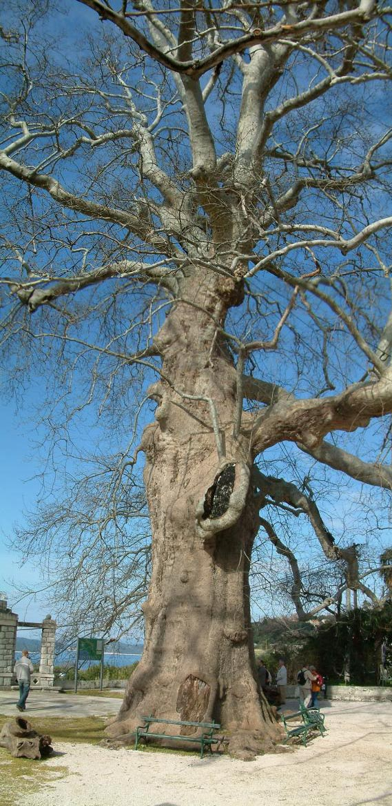 Über 500 Jahre alte Platane in Trsteno/Kroatien (Nähe Dubrovnik), am Eingang des dortigen Botanischen Gartens. Zum Größenvergleich beachte man die Sitzbänke rund um den Baum.